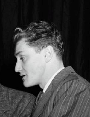 Fragment zdjęcia: "Radio._Radio_Carabin_BAnQ_P48S1P23116.jpg" z zasobów Wikimedia Commons